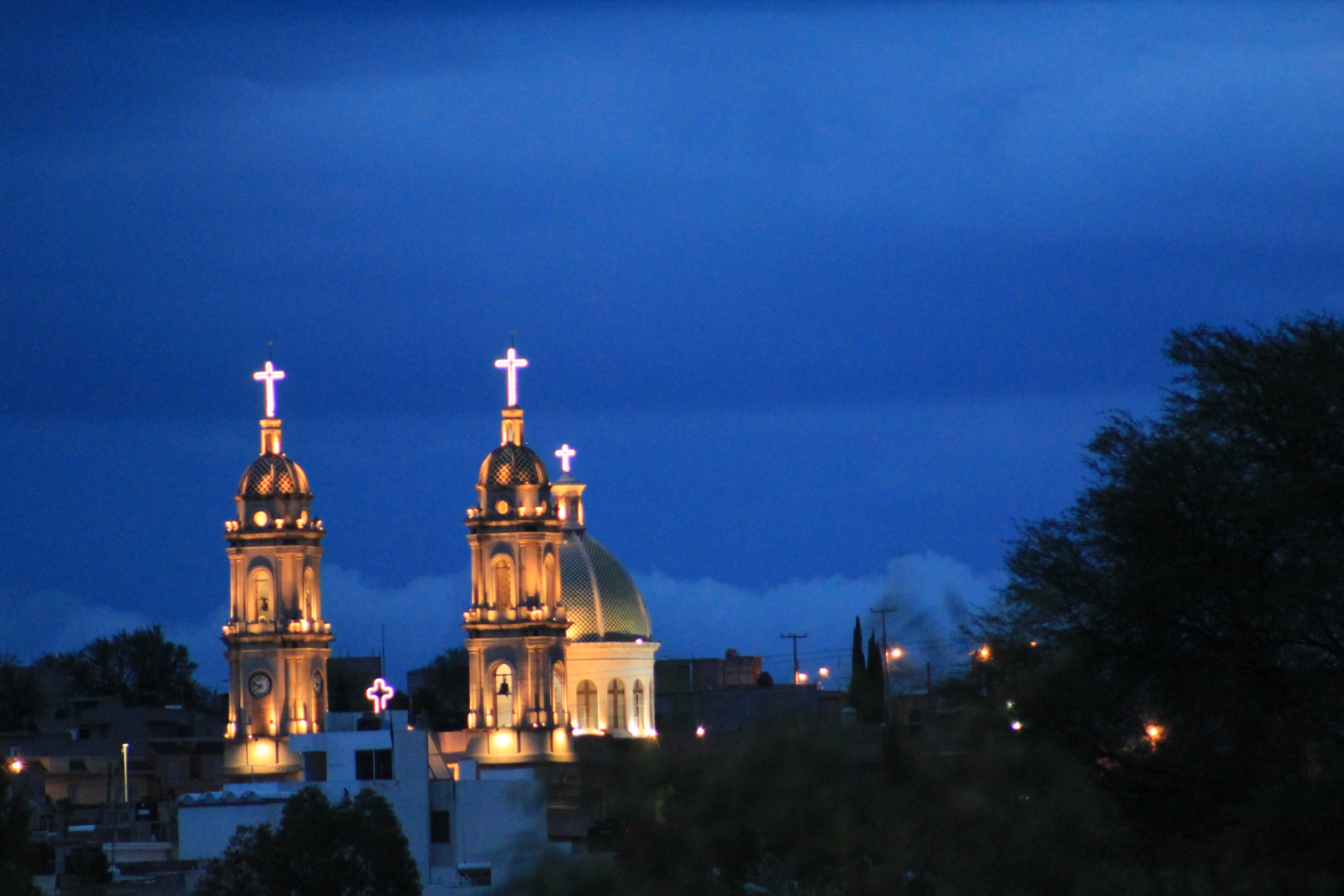 Parroquía de santa veracruz iluminada en la noche